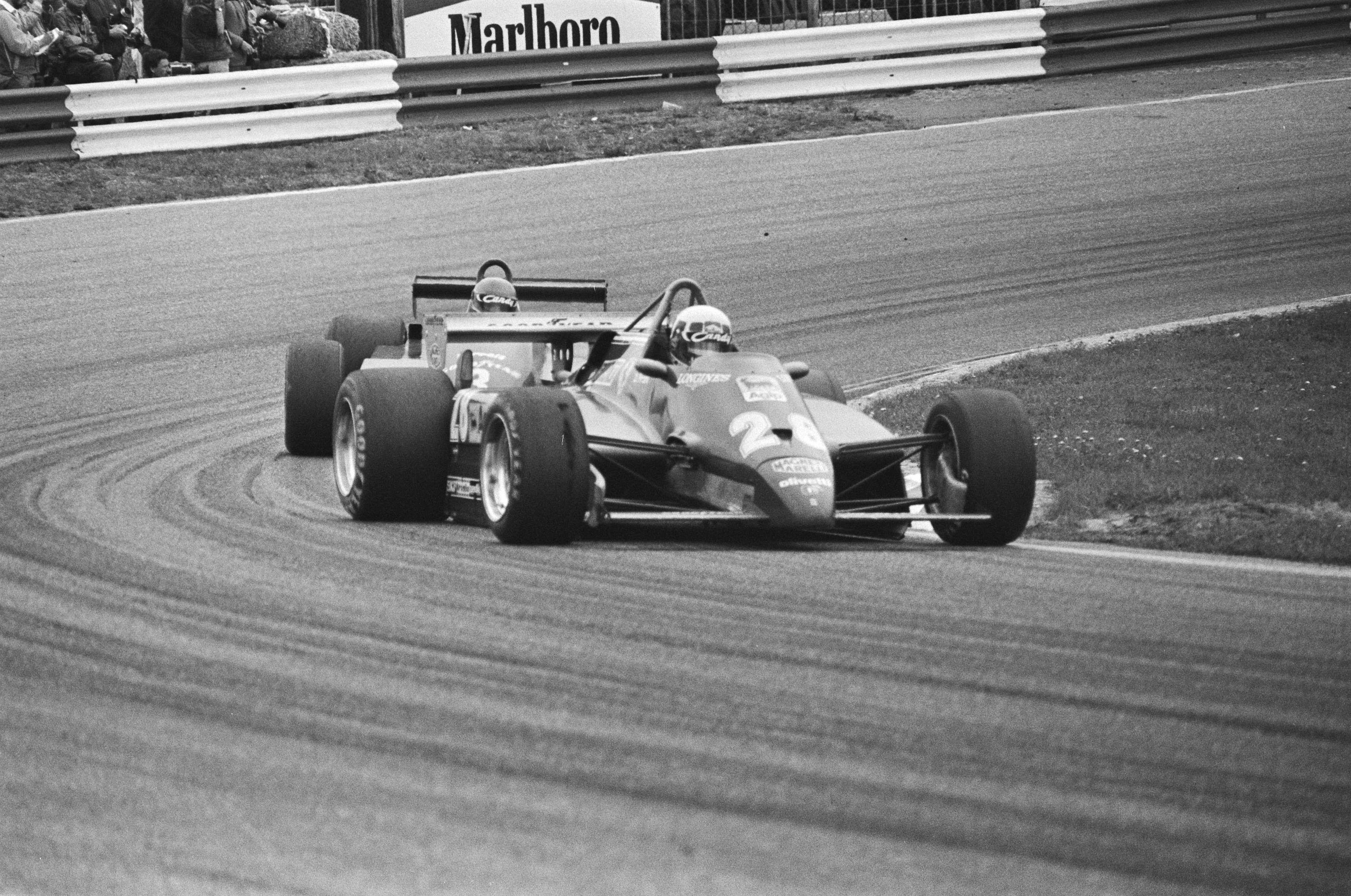 Grand Prix van Nederland te Zandvoort; no. 28 winnaar Pironi in aktie.